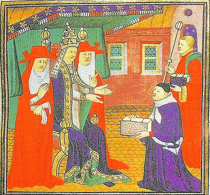 Jean d'Andreas presentant spn Commentaires sur les Decretales à Jean XXII